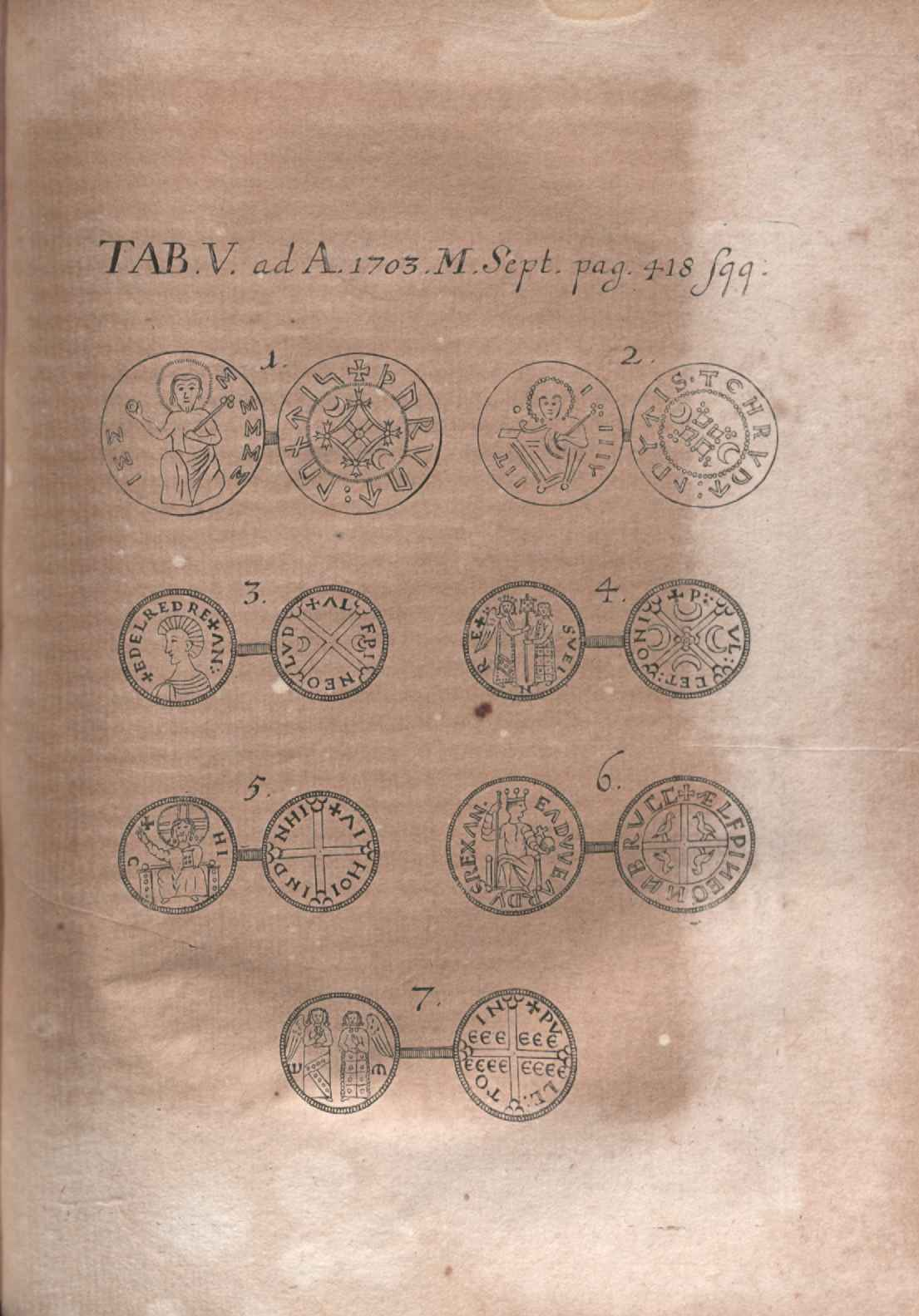 Illustration